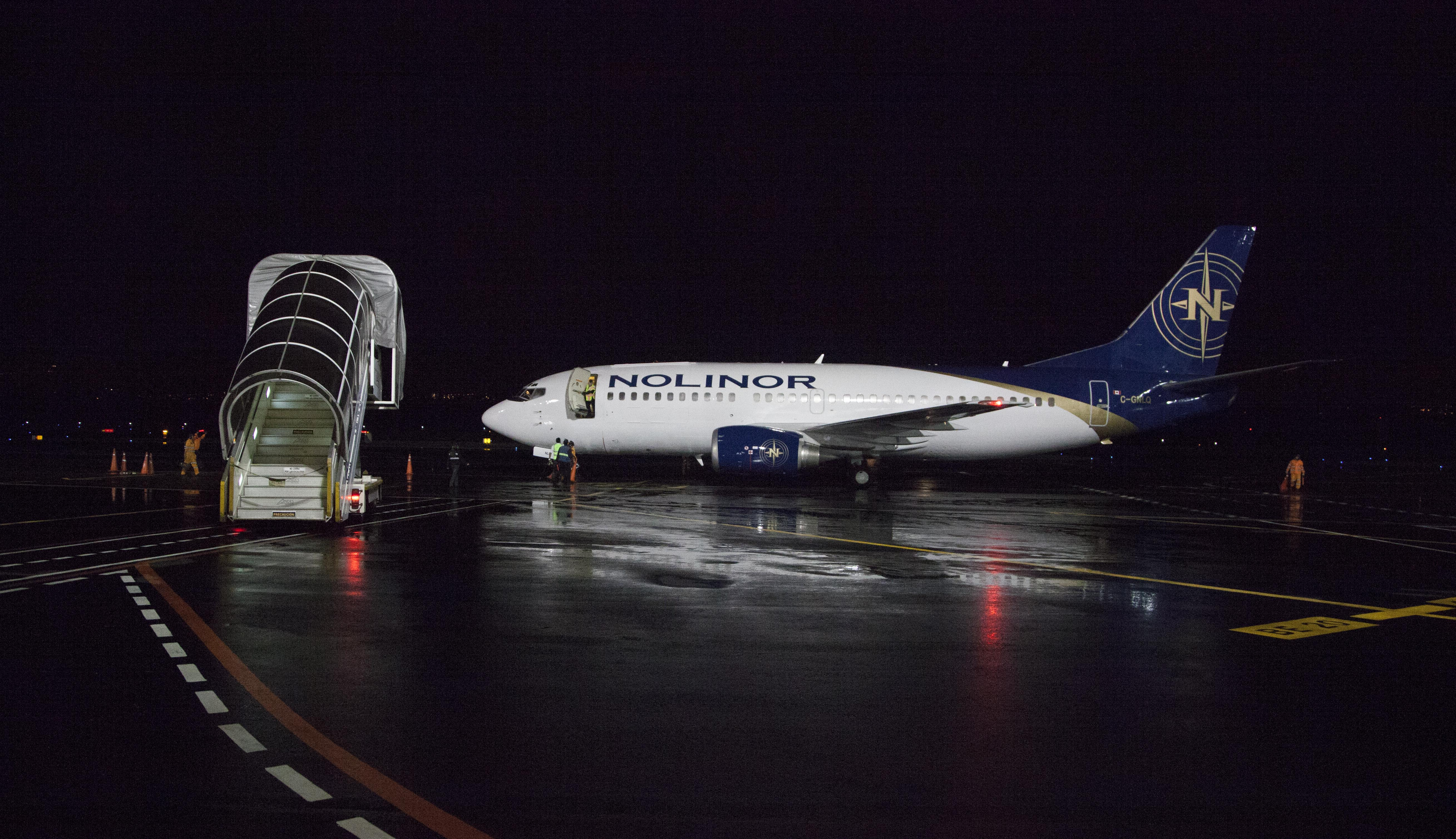 El Ministro de Relaciones Exteriores y Movilidad Humana, Guillaume Long, recibió este sábado 15 de octubre a autoridades de alto nivel de Naciones Unidas que arribaron al Aeropuerto Internacional Mariscal Sucre de la capital ecuatoriana para participar en la Conferencia de las Naciones Unidas sobre Vivienda y Desarrollo Urbano Sostenible, Hábitat III.